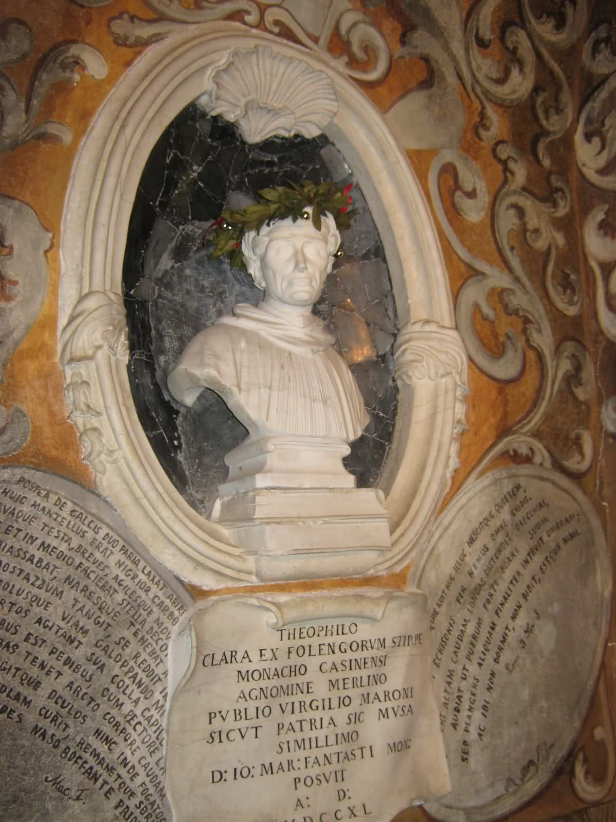 Cappella funeraria di Teofilo Folengo a Campese, busto in marmo